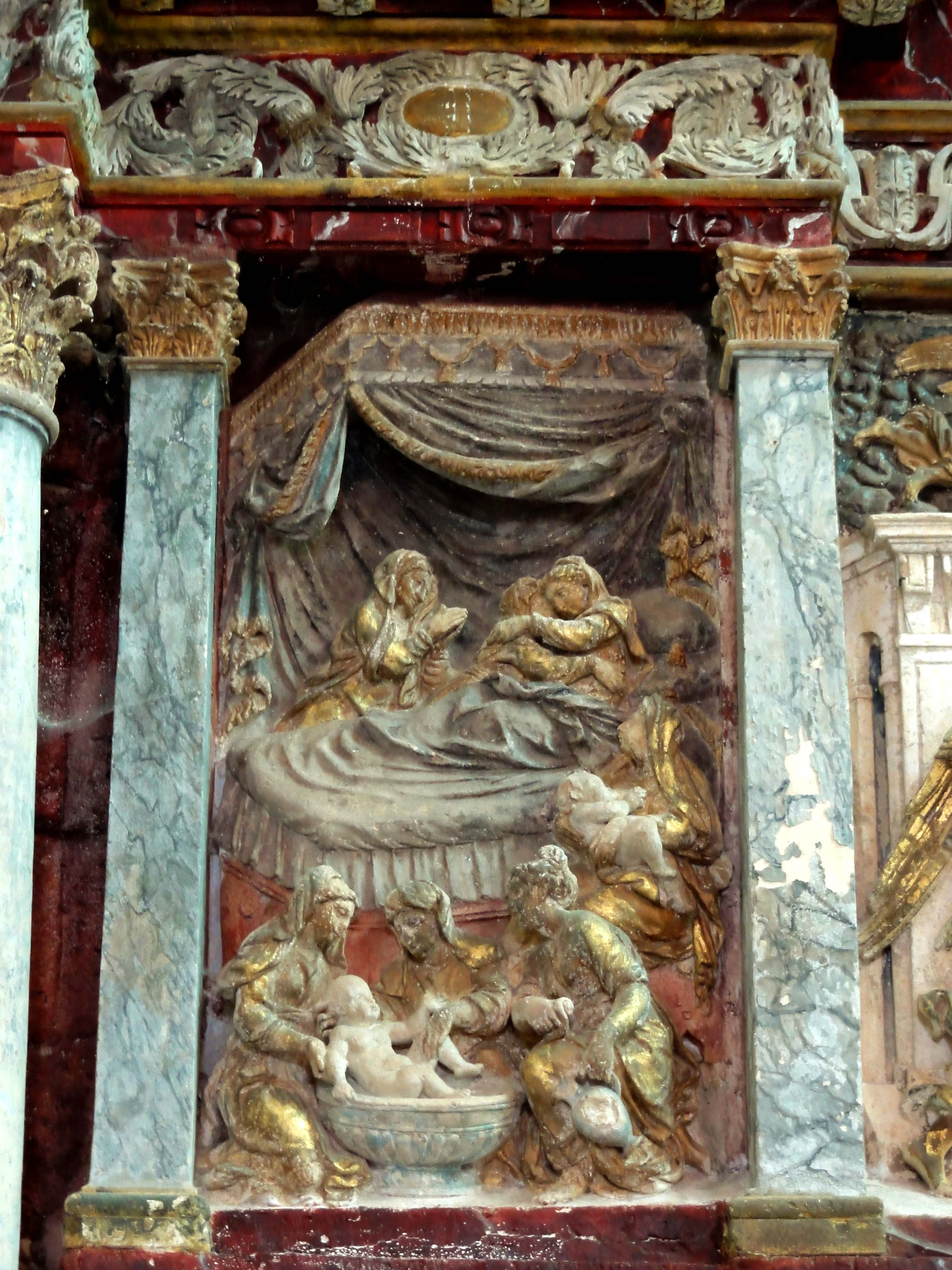 Retable du maître-autel, XVIIe siècle.